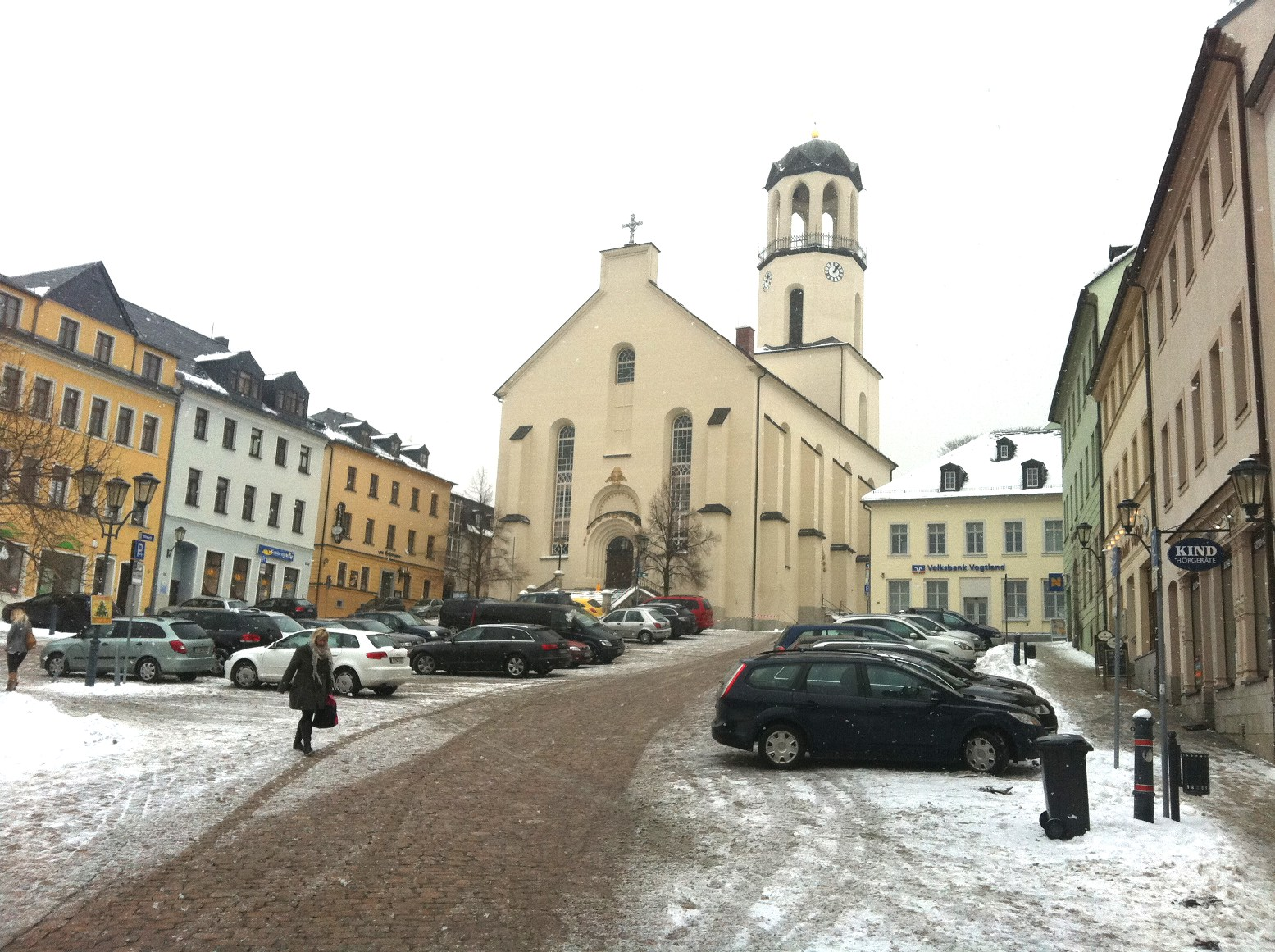 Auerbach Vogtland, Innenstadt Sankt Laurentius